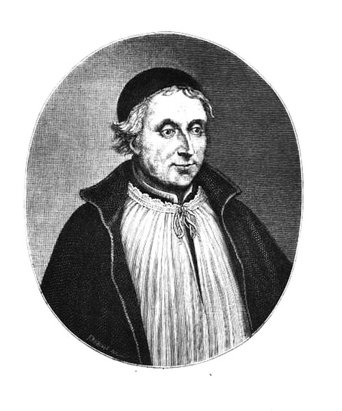 Portrait du père Bourdaloue